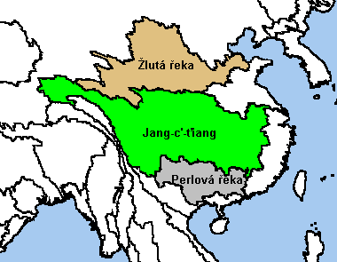 Povodí tří nejvýznamnějších čínských řek nakreslil Miaow Miaow 26.02.2005